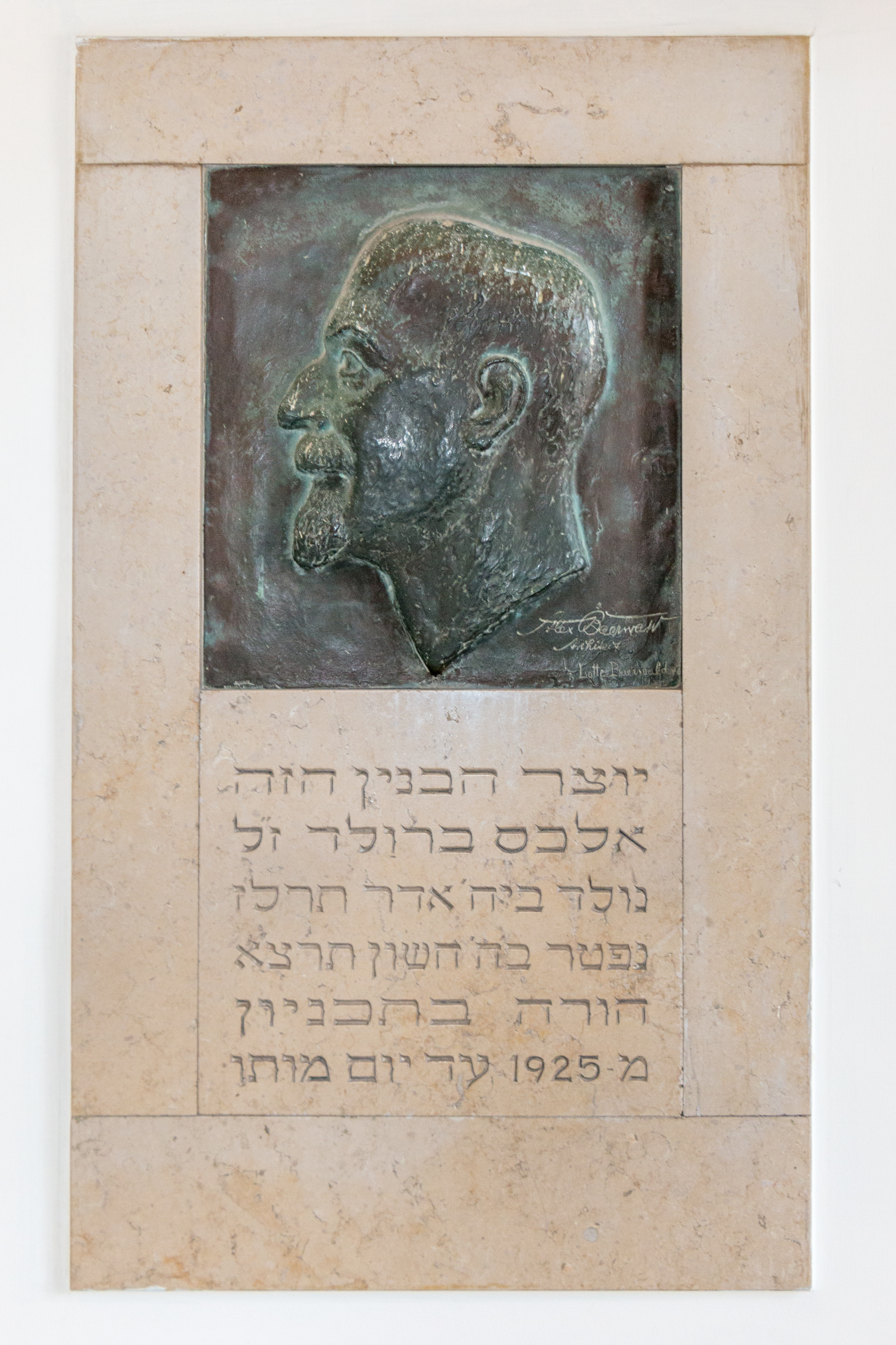 דמותו של אלכסנדר ברוולד בבניין ההיסטורי של הטכניון בשכונת הדר בחיפה, היום בניין התערוכות של מדעטק - המוזיאון הלאומי למדע טכנולוגיה וחלל